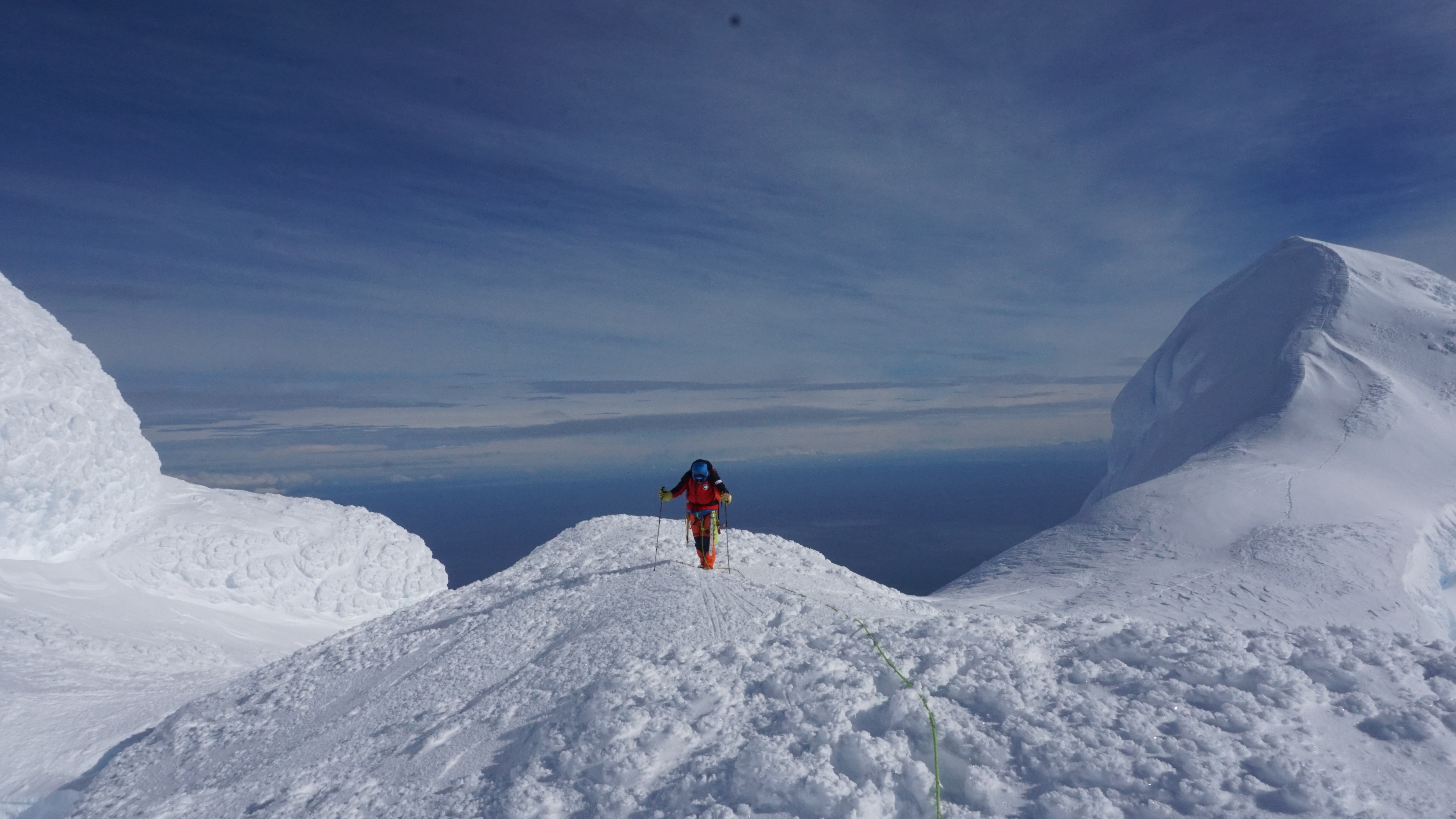 На седловината между върховете Св. Борис и Фризланд